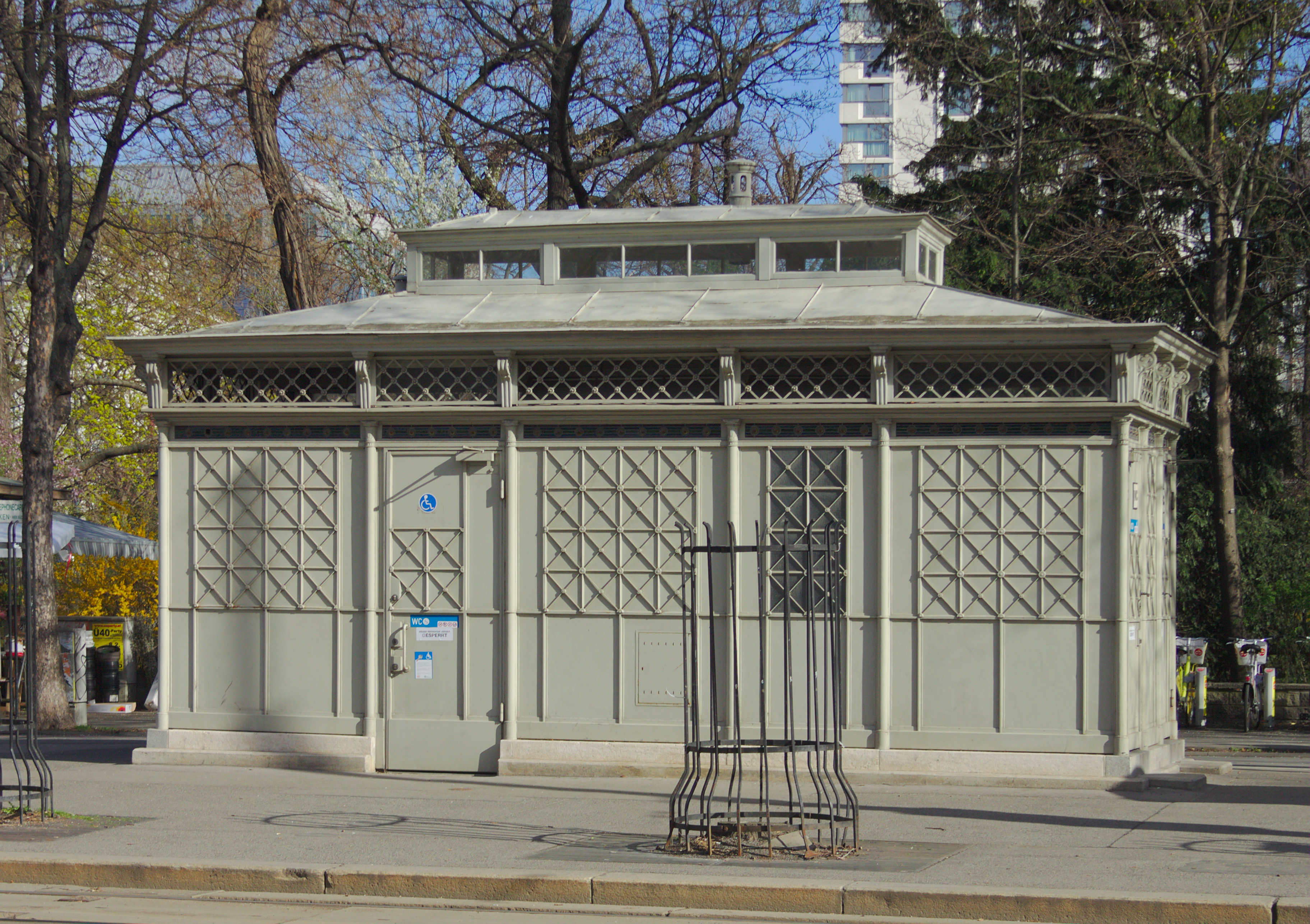 Öffentliche WC-Anlage